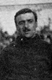 El futbolista y entrenador Francisco Bru durante su participación en los Juegos Olímpicos de Amberes 1920 con la selección de España.